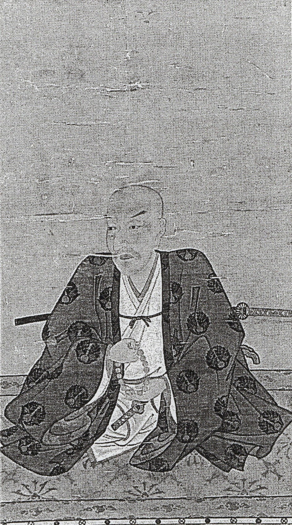 鍋島直称の肖像(モノクロ)。